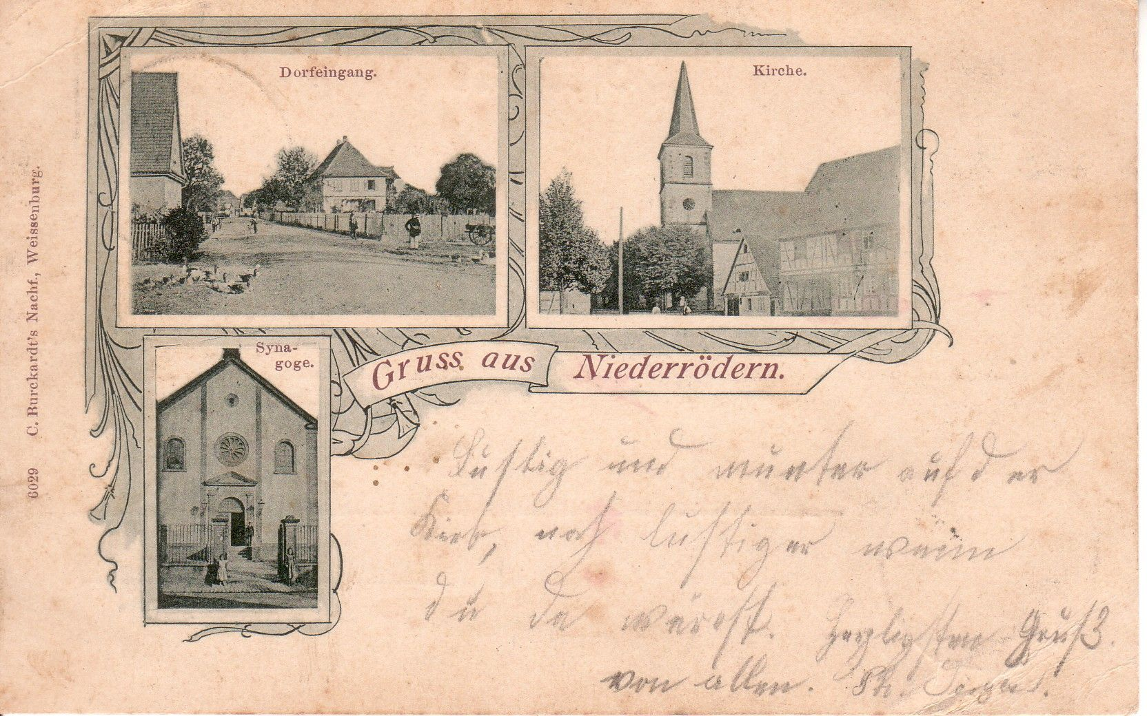 Postkarte von Niederroedern im Elsaß